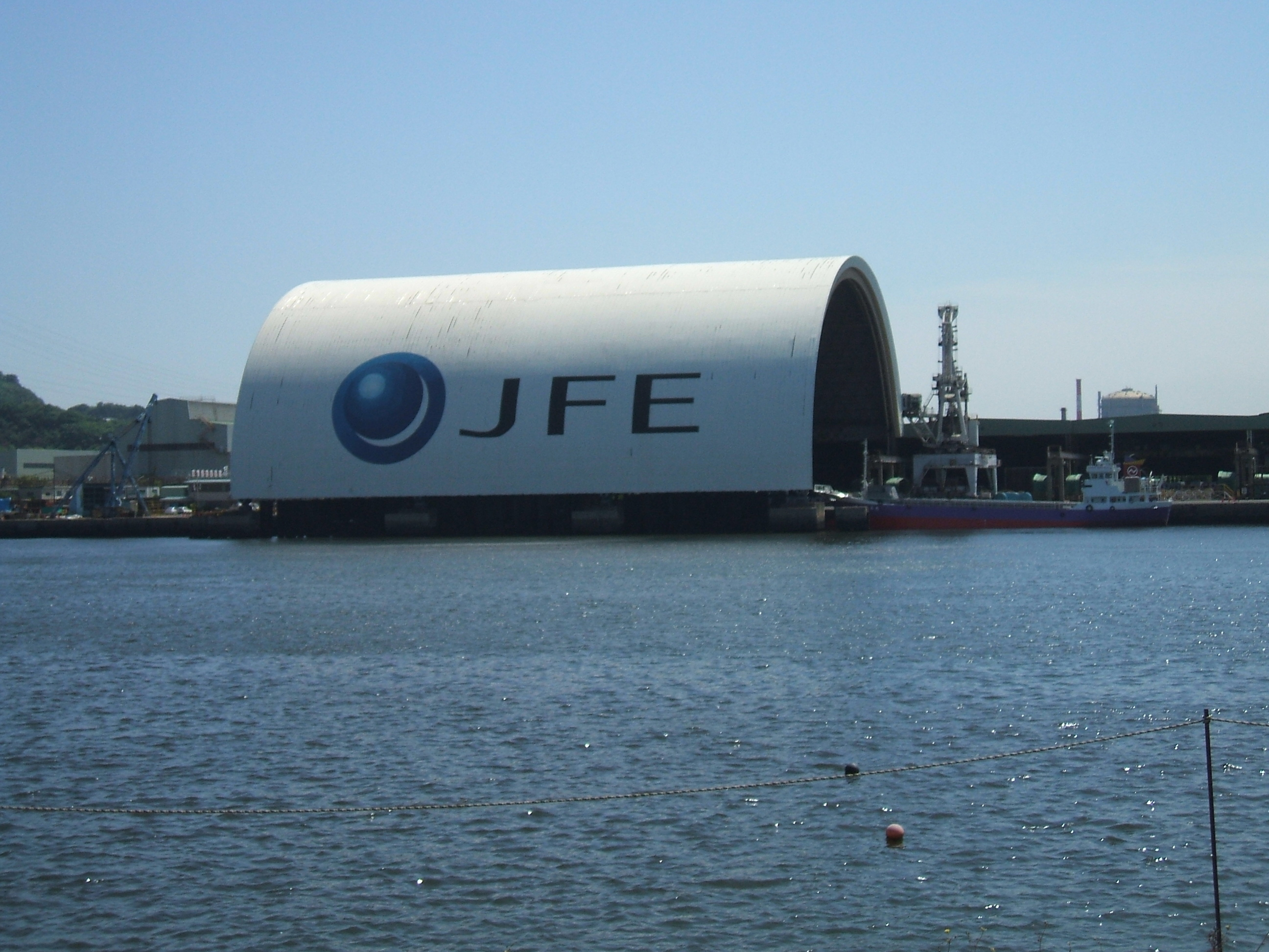 広島県福山市にあるJFEスチール西日本製鉄所福山地区の西岸壁にある船舶用屋根